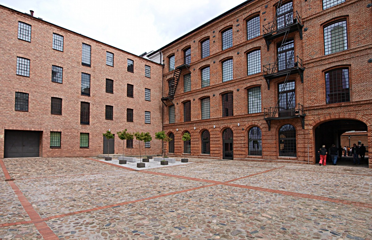 Dziedziniec Muzeum Włokiennictwa.